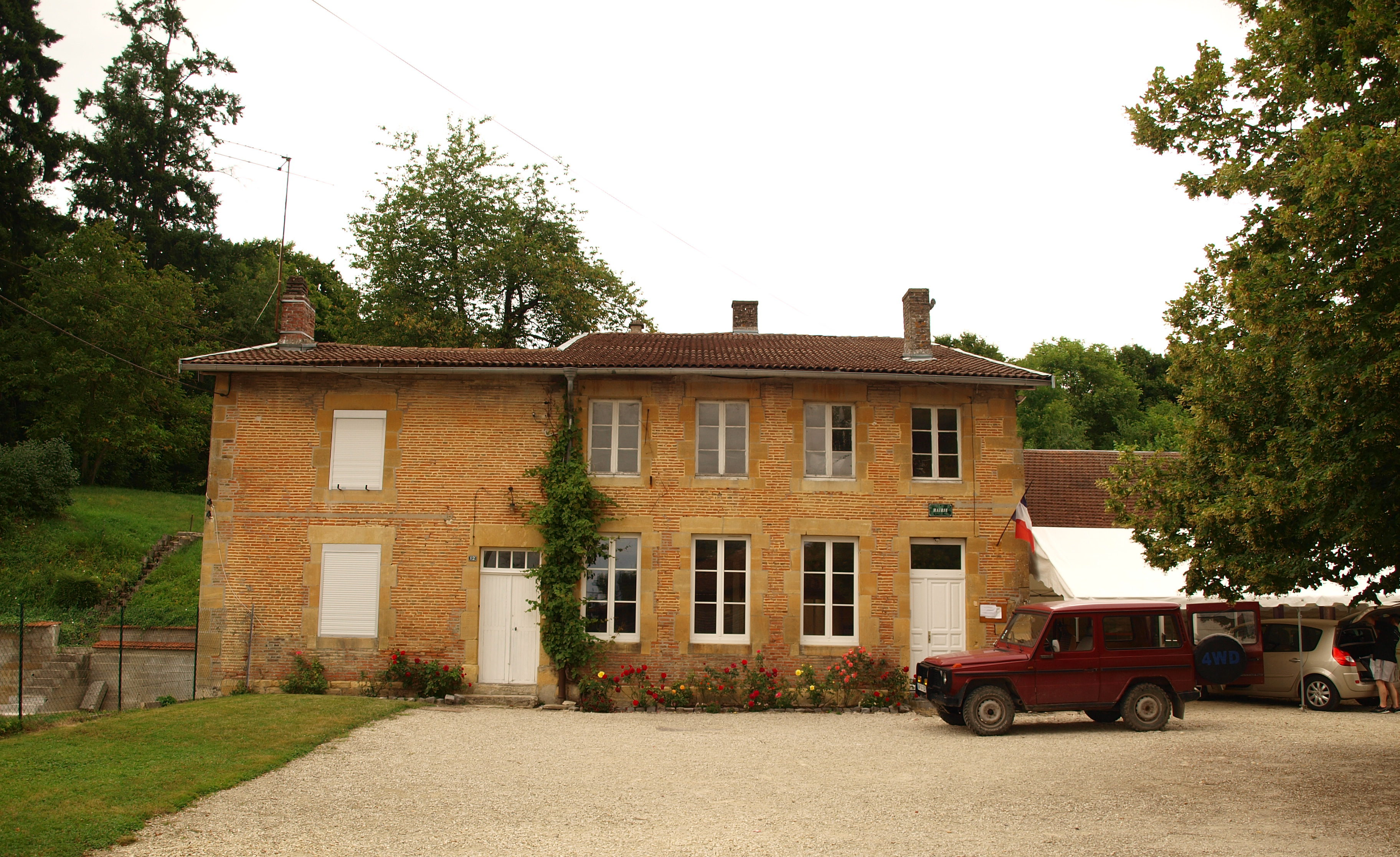 Senuc (Ardennes, France) ; mairie.